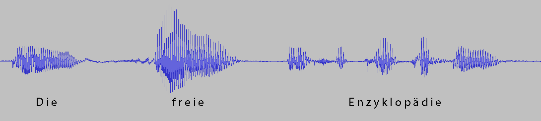 Grafik als Beispiel für eine diskrete Phrase